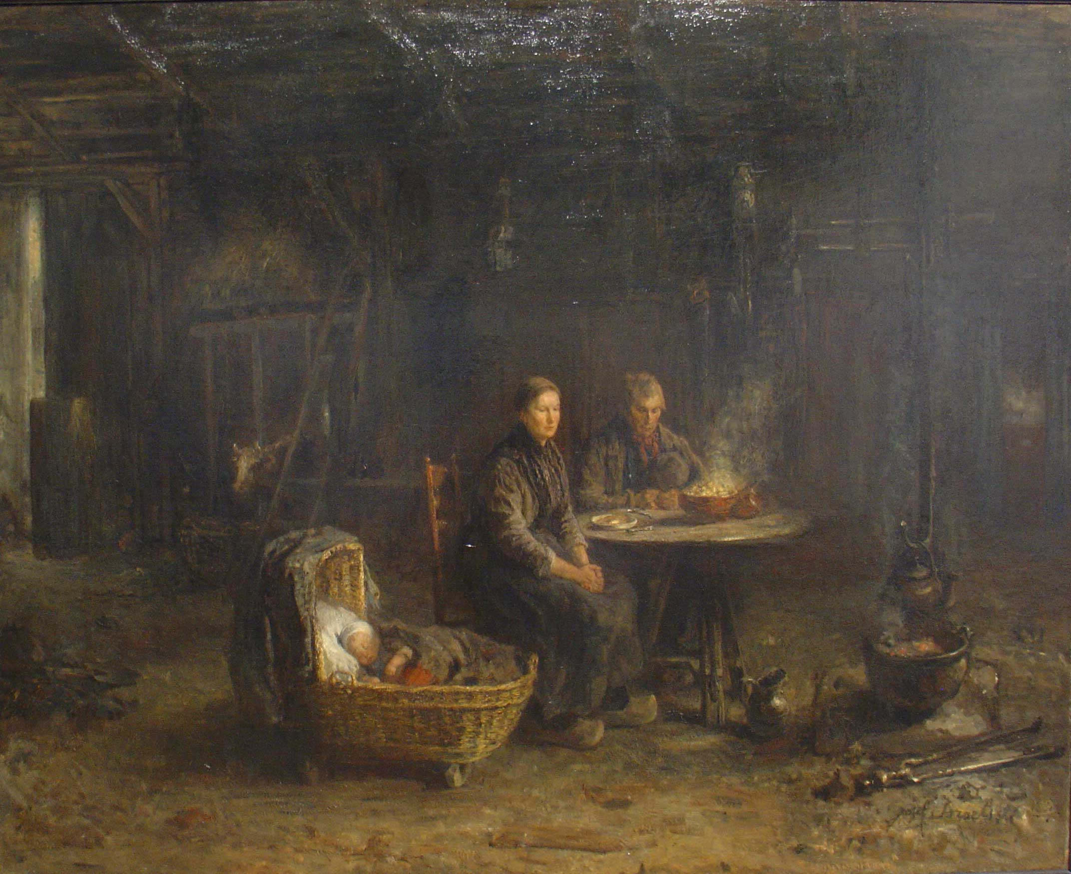 Peasant's meal in Delden